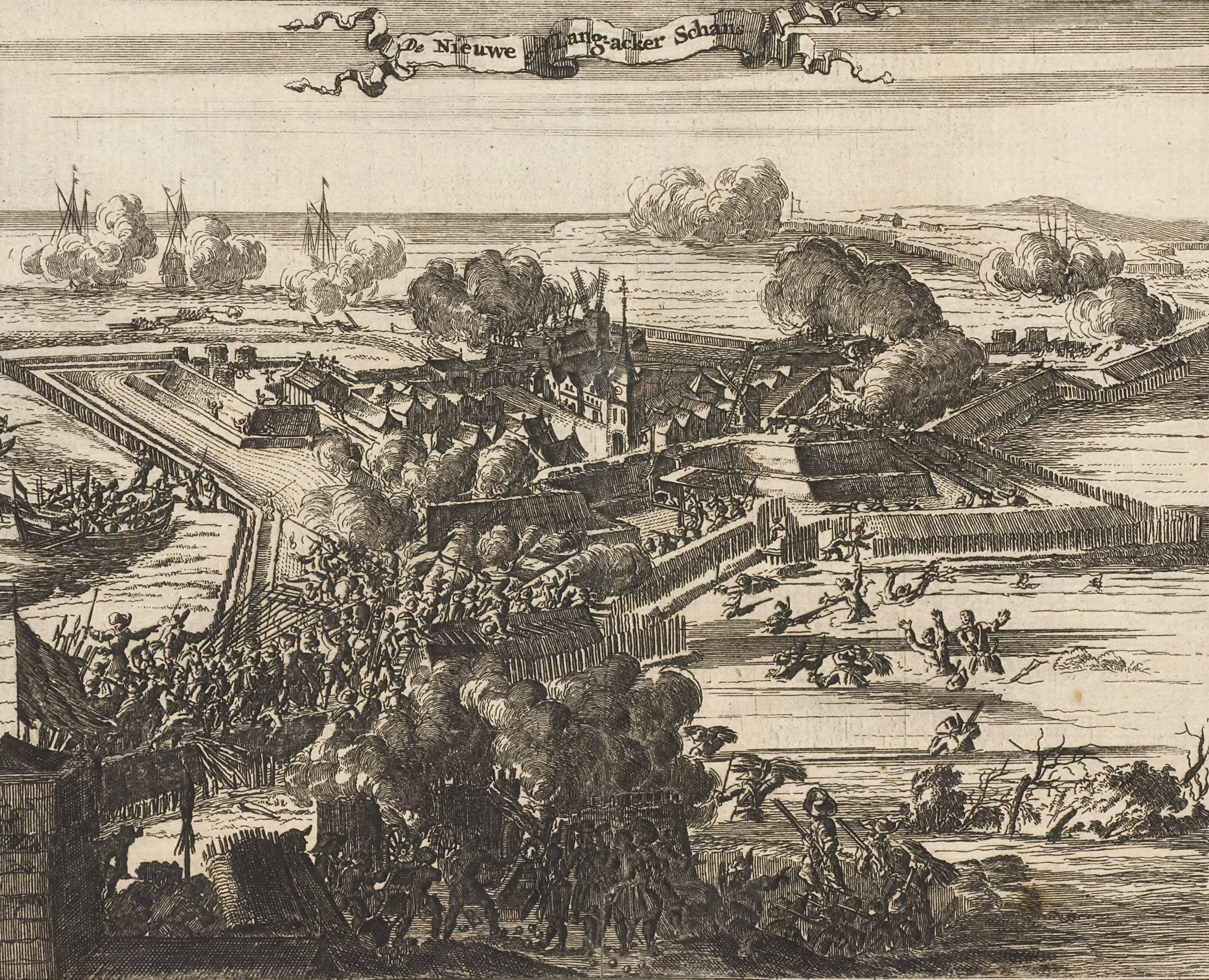 Belegring van de Langacker- of Nieuweschans, waarschijnlijk in 1672